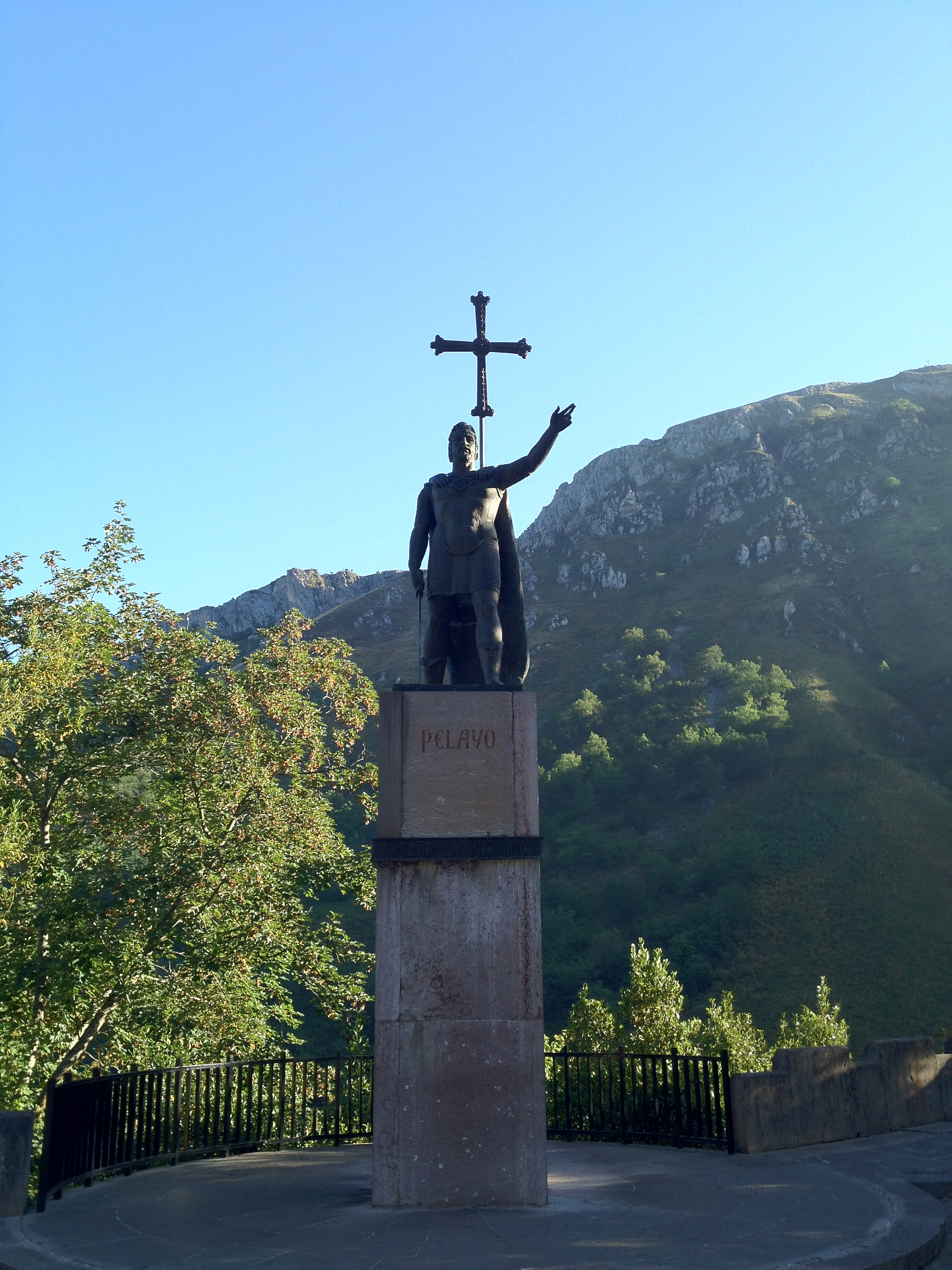 Estatua en bronce de Don Pelayo